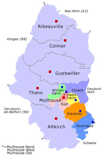 Arrondissement Mulhouse mit Verwaltungsgiederung und Lage im Département Haut-Rhin.